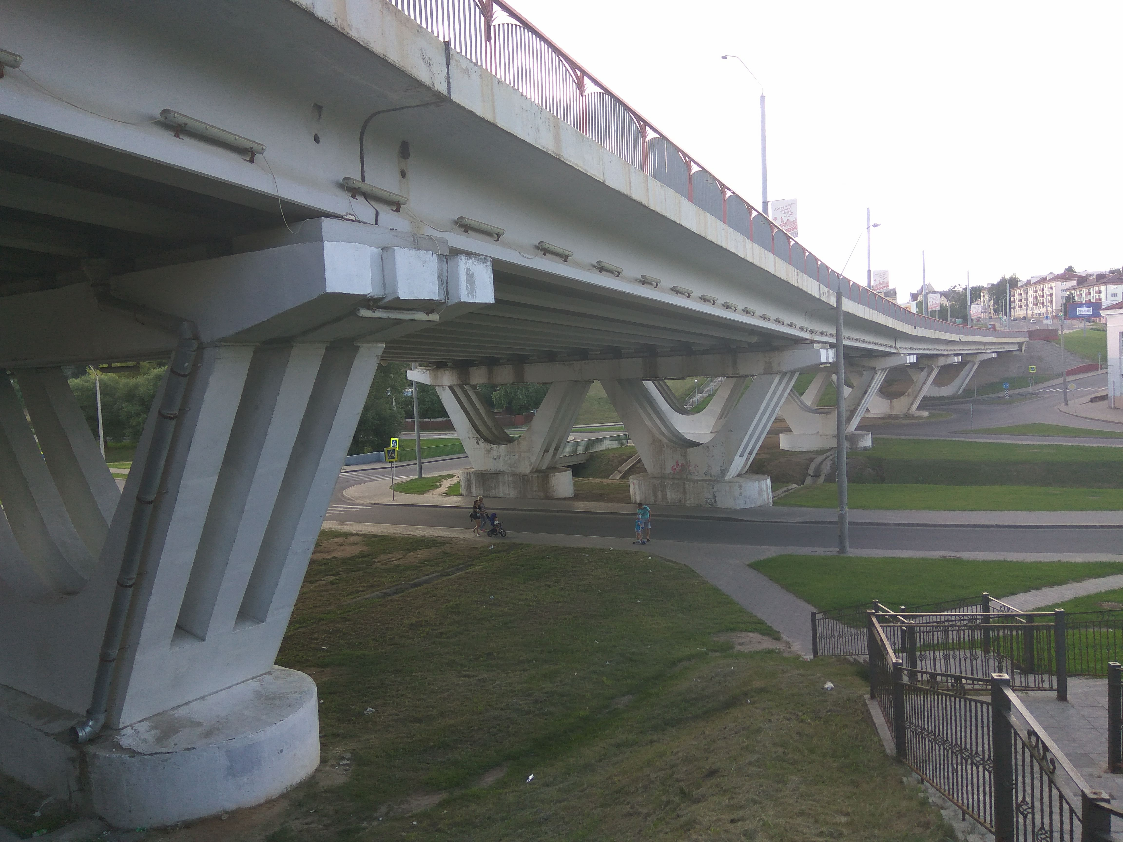 Магілёў. Вуліца Лазарэнкі (ліпень 2018)